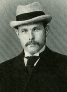 Борисов, Александр Алексеевич